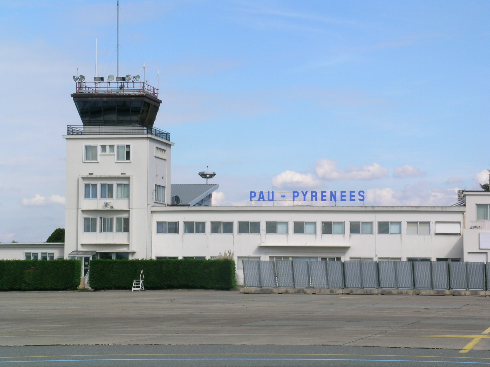 Tour de controle de Pau